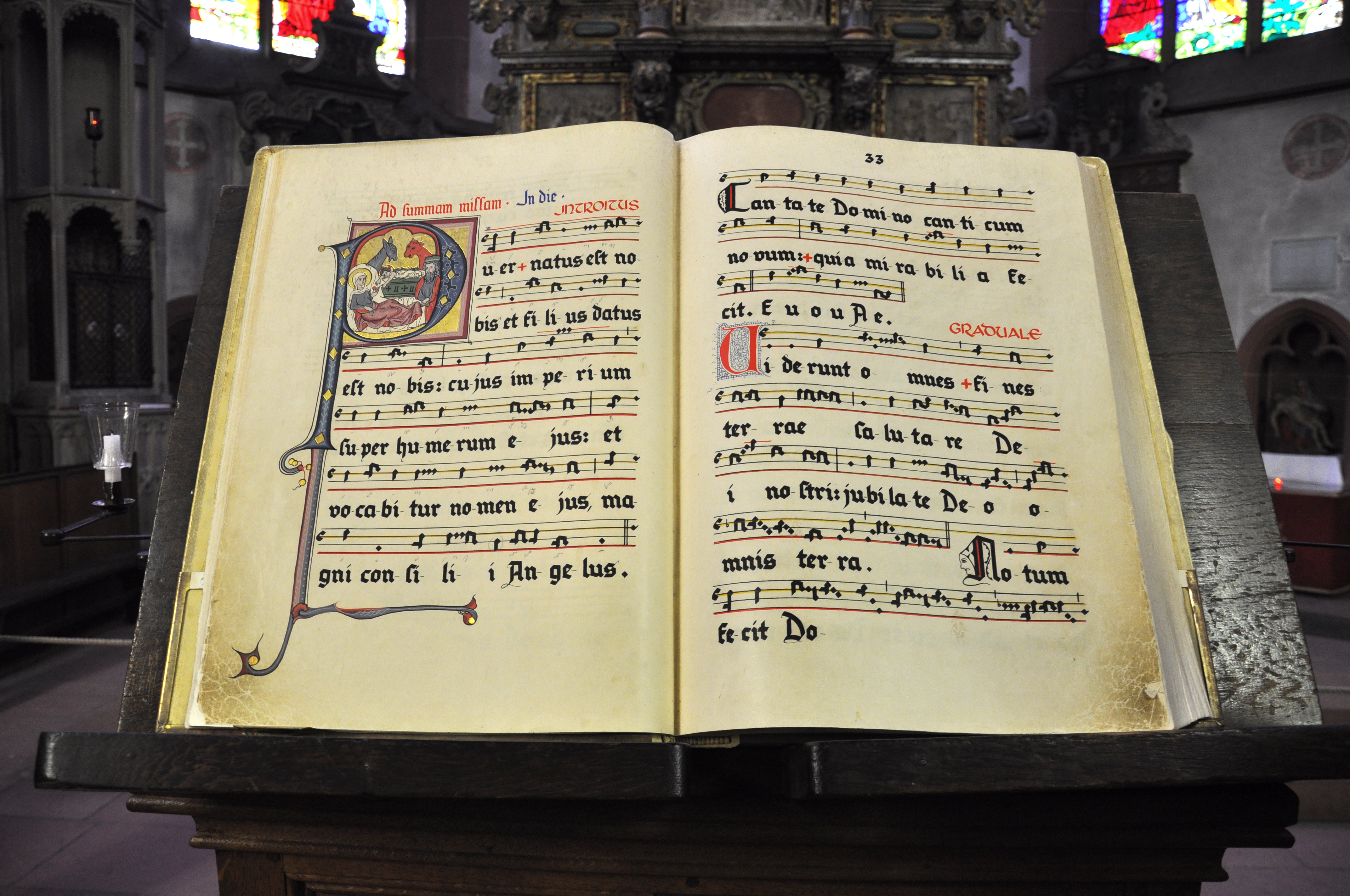 Kiedrich, Pfarrkirche St. Valentin, Faksimile der Choralhandschrift (Kiedrich Codex A, kurz nach 1300; aus dem Mainzer Dom)